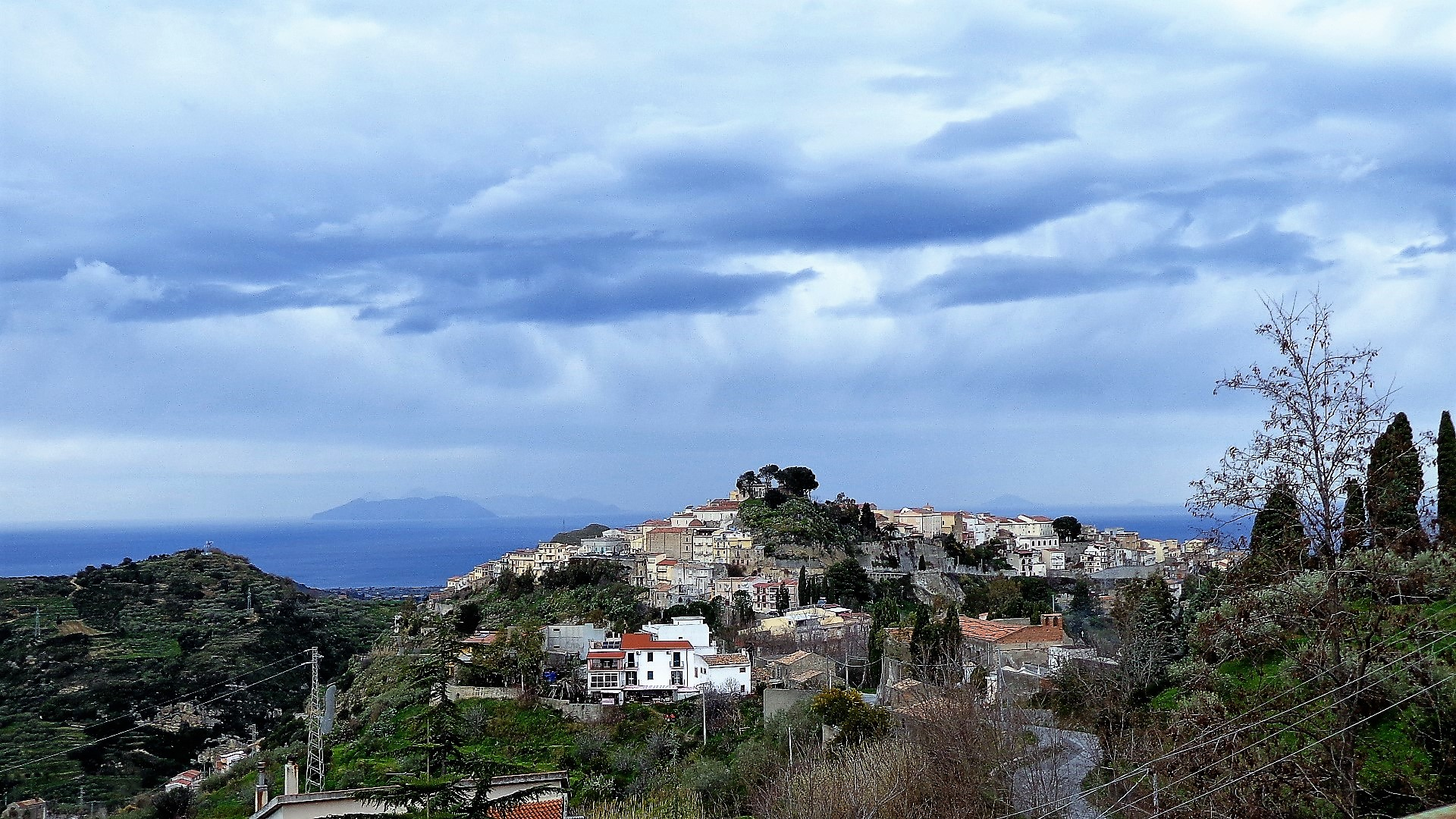 Panorama